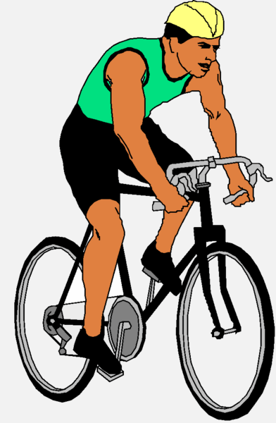 Cycling